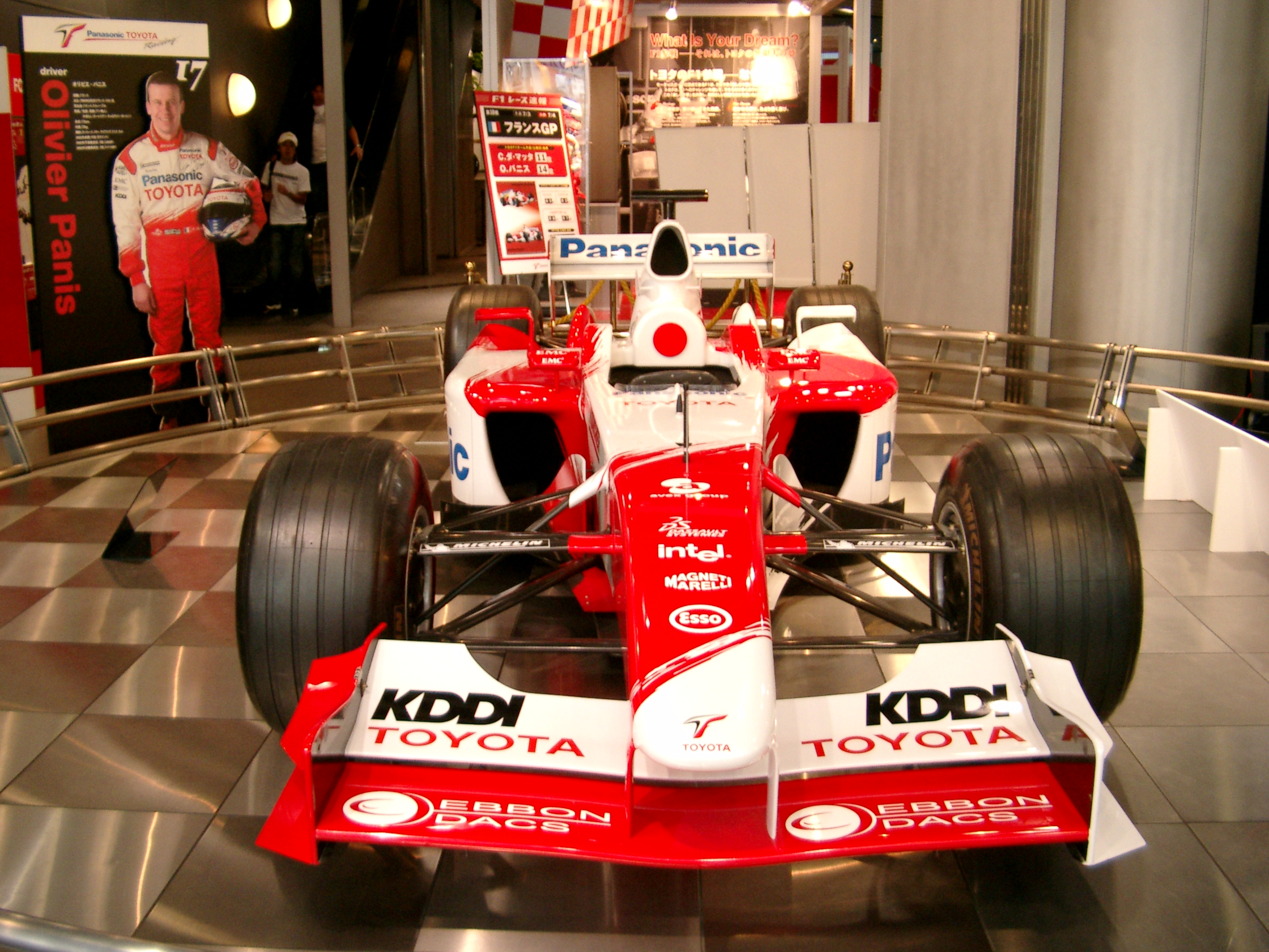 Formel 1 Wagen von Olivier Panis im Toyota Center in Tokyo selbstfotografiert